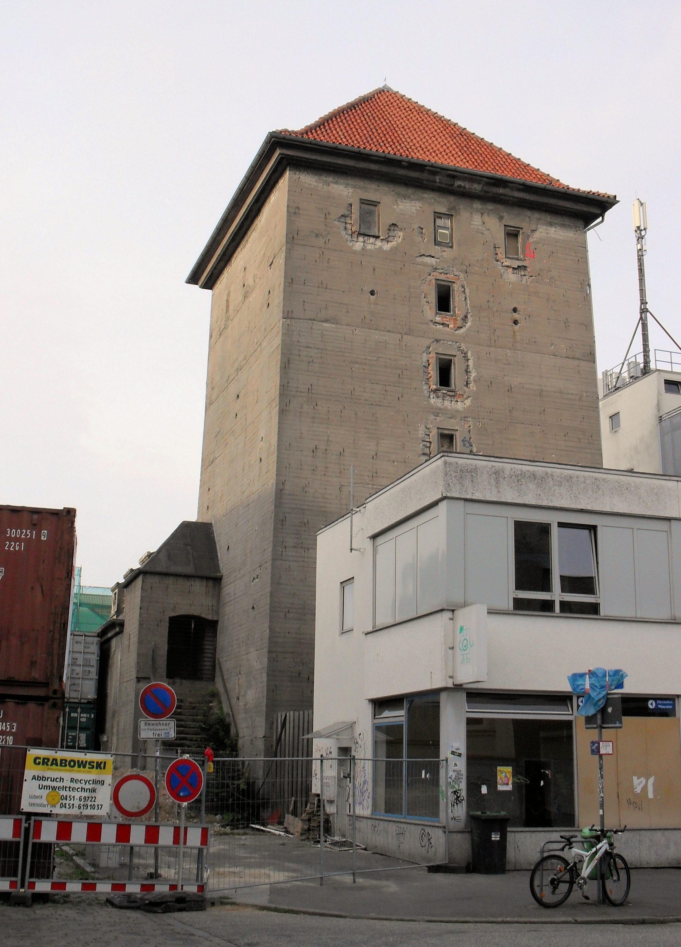 Der Aalhof-Bunker in der Straße An der Mauer, Ecke Hüxterdamm in Lübeck